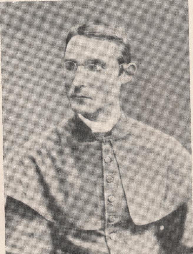 Bischof Franz Egger, Brixen